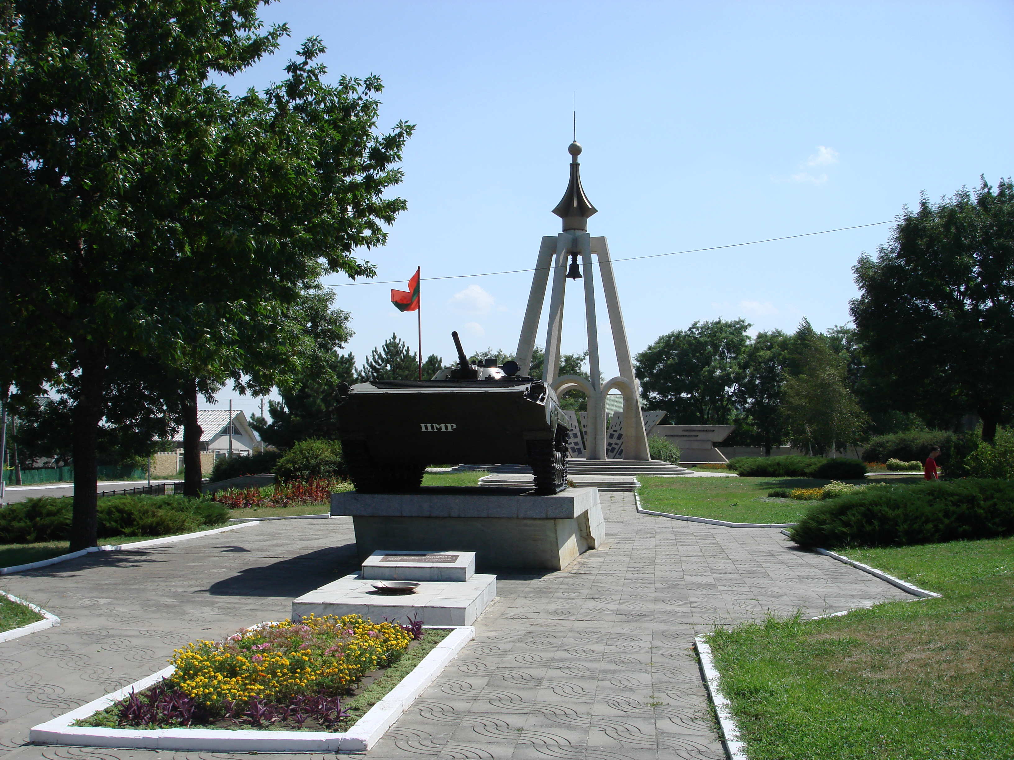 Мемориал Славы (Бендеры)